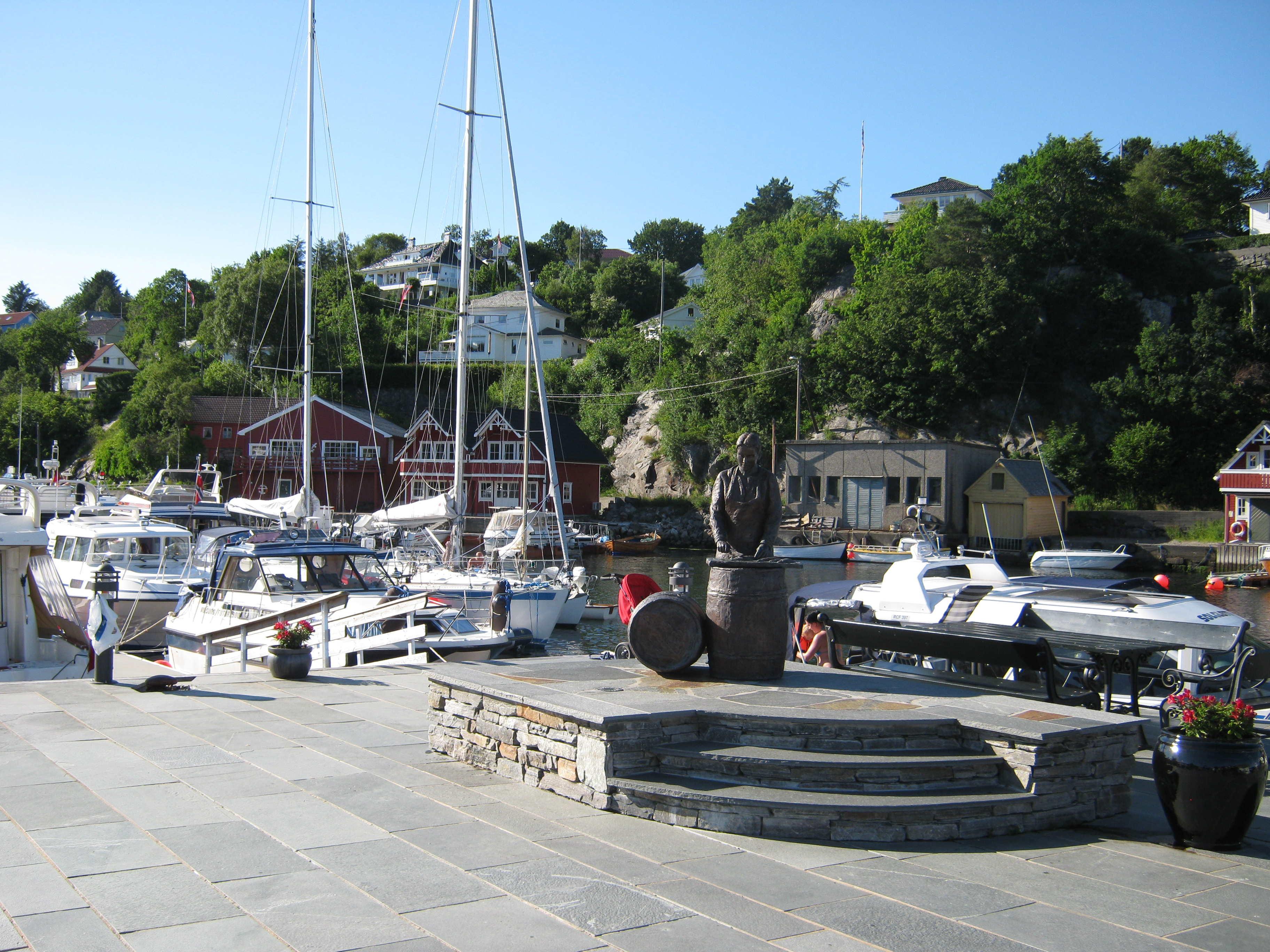 Statuen "Sildajento" på Bekkjarvik, Austevoll kommune